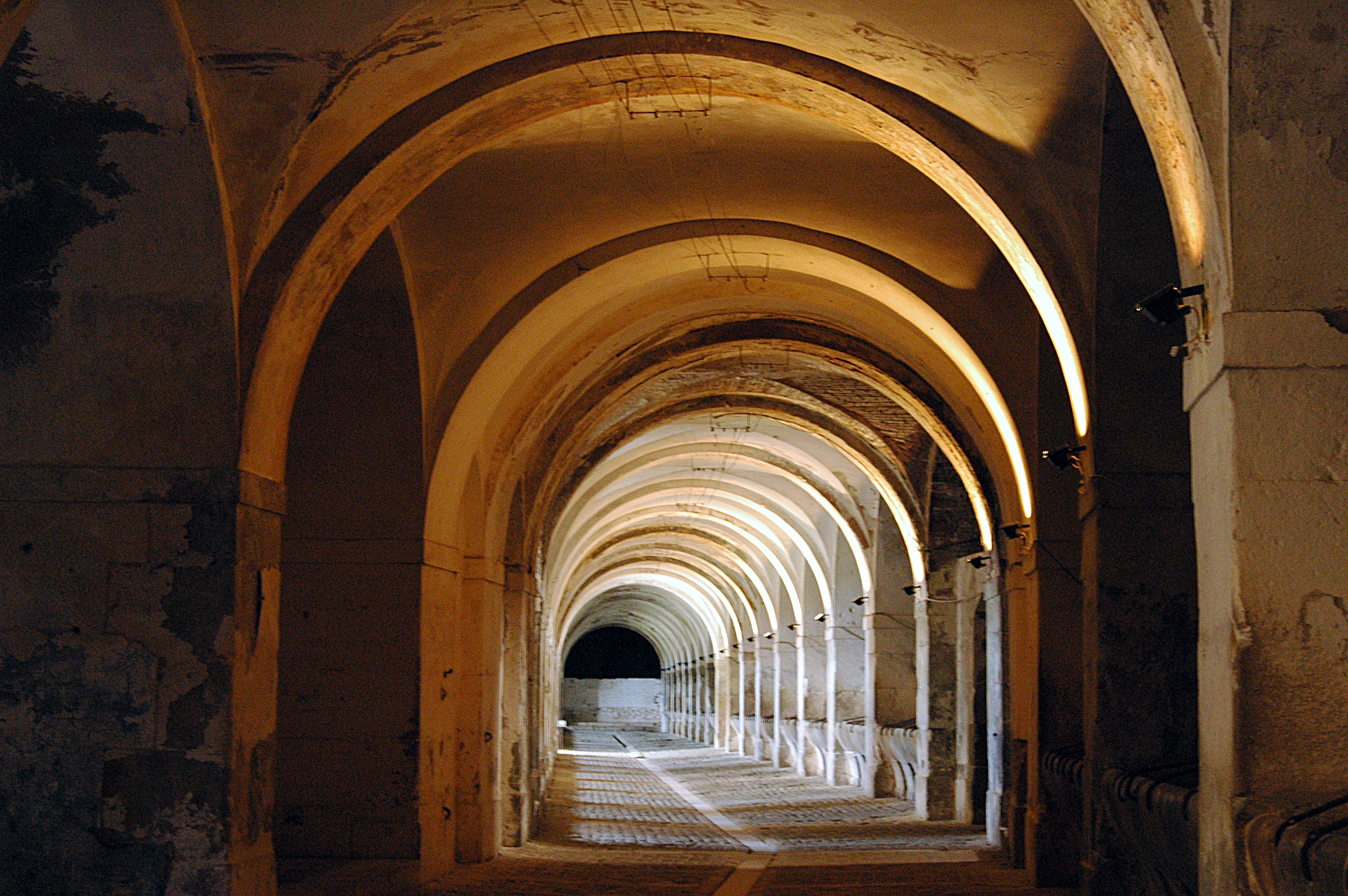 Castell de Sant Ferran (Figueres)